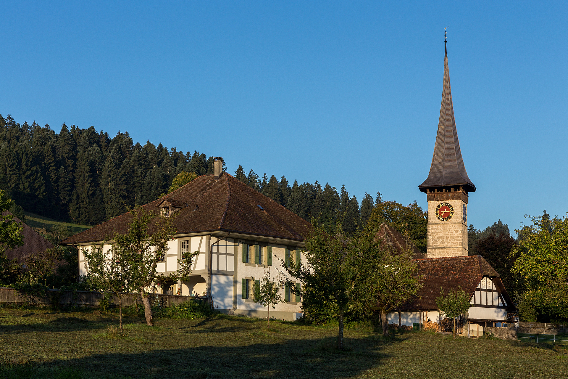 Pfarrhaus, Kirche und Ofenhaus in Rüderswil im Emmental